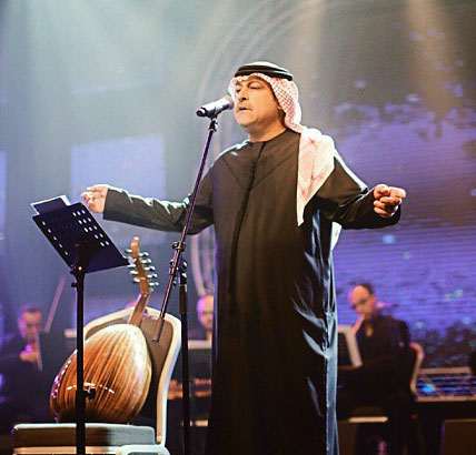 ميحد حمد حفلة ليلة طرب 2014 فندق سانت ريجيس بجزيرة السعديات ضمن فعاليات «أبوظبي عيدكم وفرحتكم»